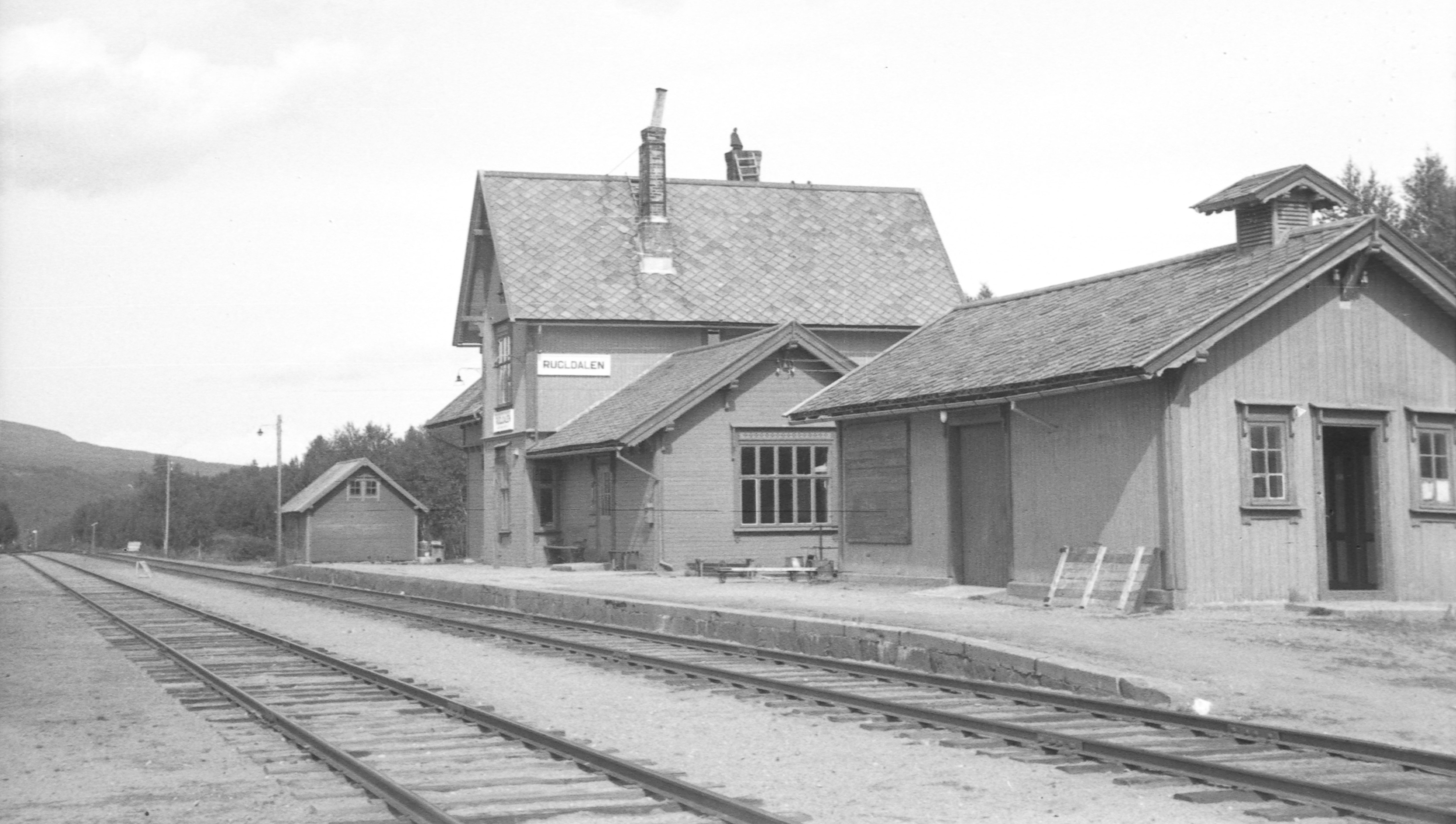 Rugldalen stasjon i 1946. Foto: Kåre A. Jørgenvaag/NTNU UB. ID: J-136-5_01.